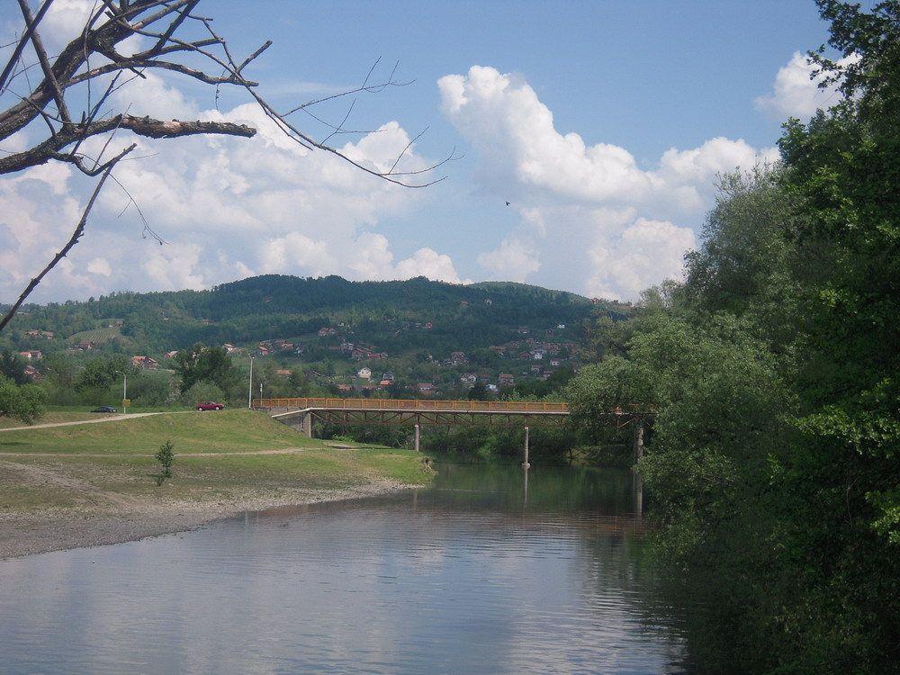 Most_kod_Incela_preko_rijeke_Vrbanje (Banja Luka)